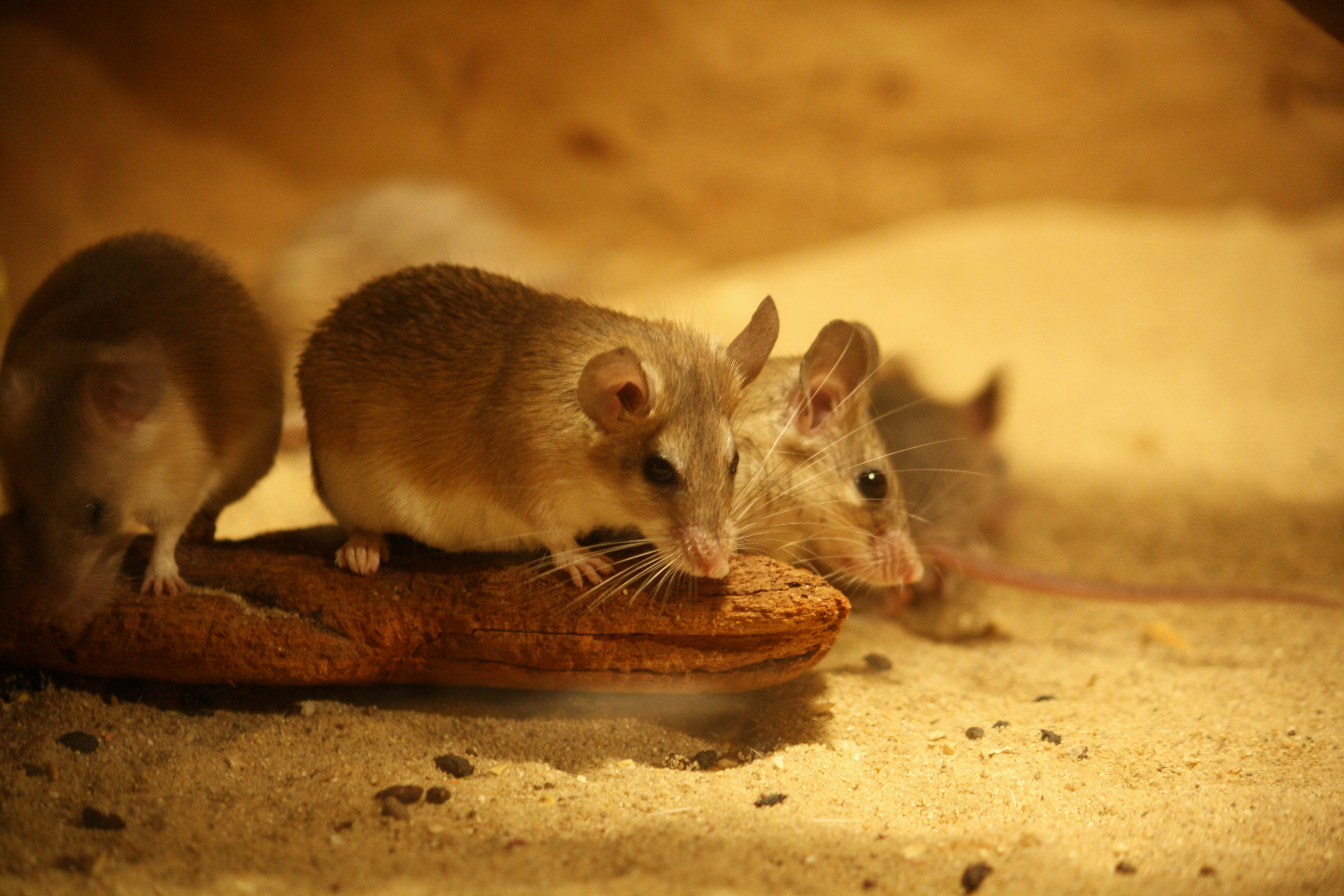 Pražská zoologická zahrada - bodlinatka turecká